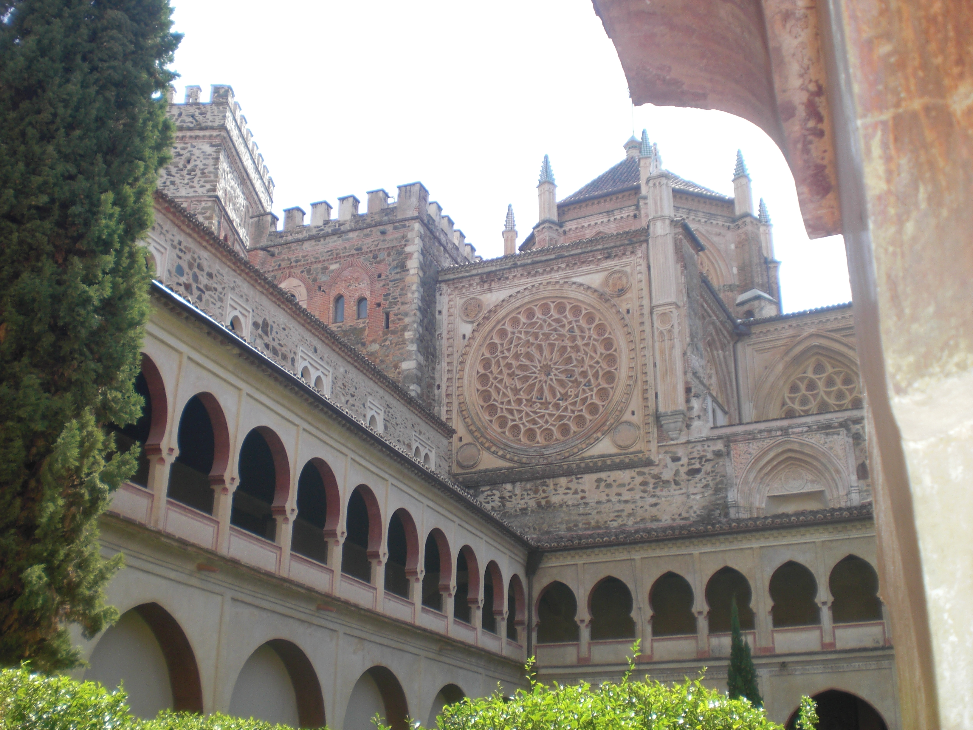 Mudehxara klostro de Guadalupe.